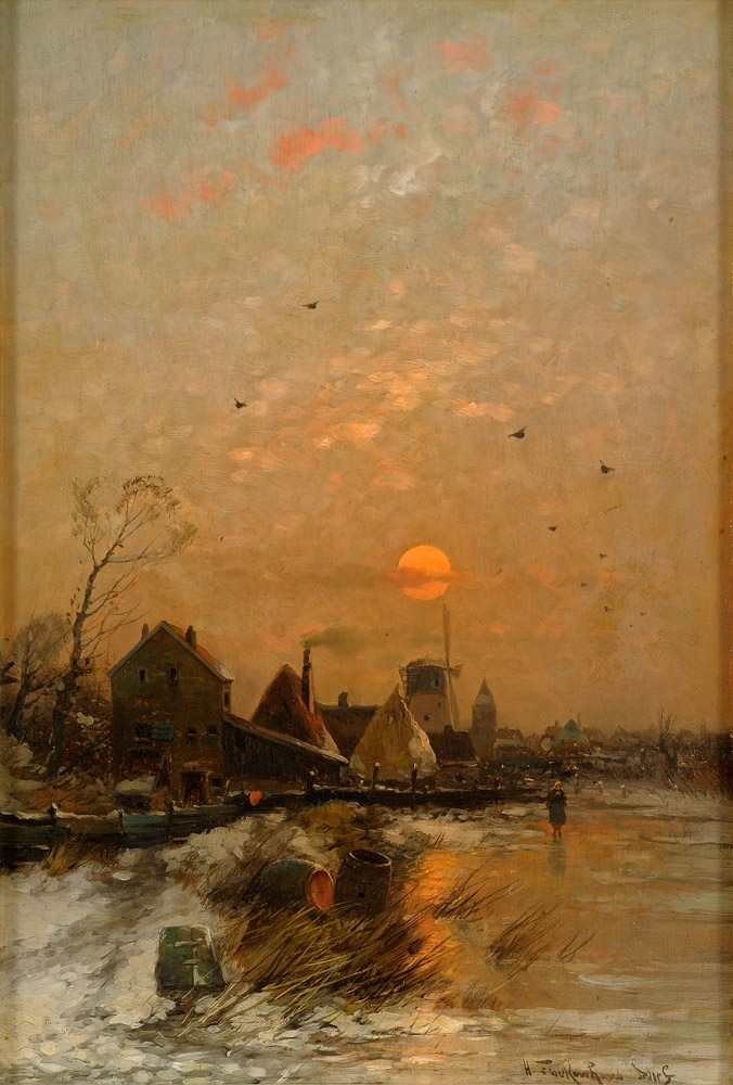 Winterlandschaft. Signiert. Öl auf Holz.